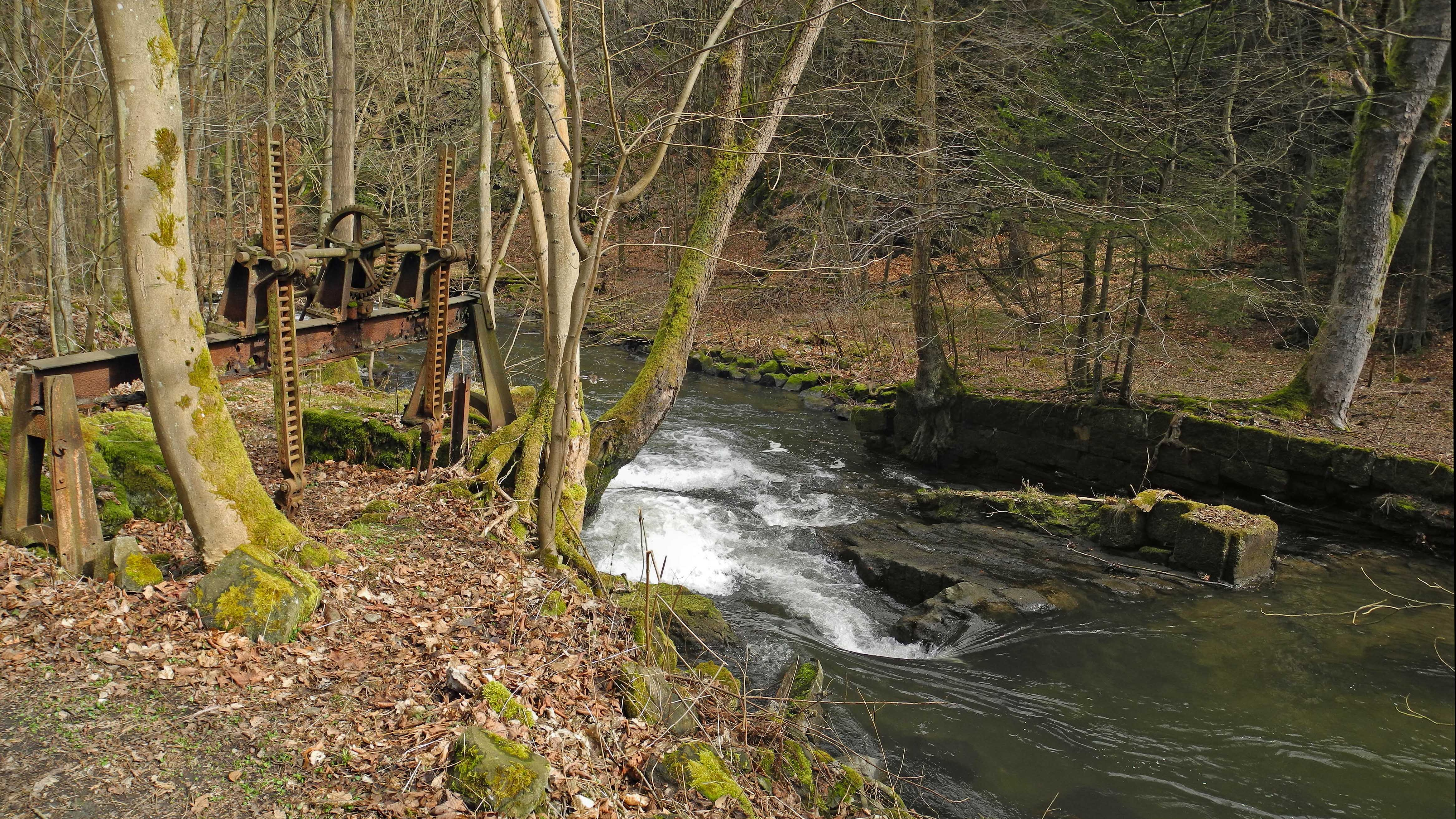 Wehr und Absperranlagen für den Mühlgraben der ehem. Sputhmühle im Sebnitztal, Landkreis Sächsische Schweiz-Osterzgebirge